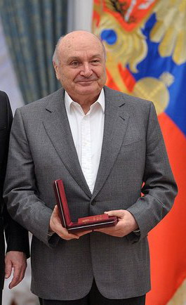 Михаил Жванецкий